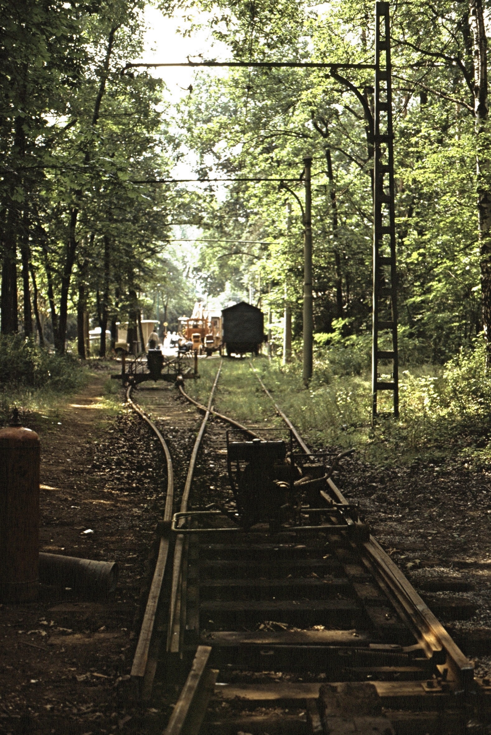 Strab Woltersdorf Bauarbeiten an der Endstelle Rahnsdorf